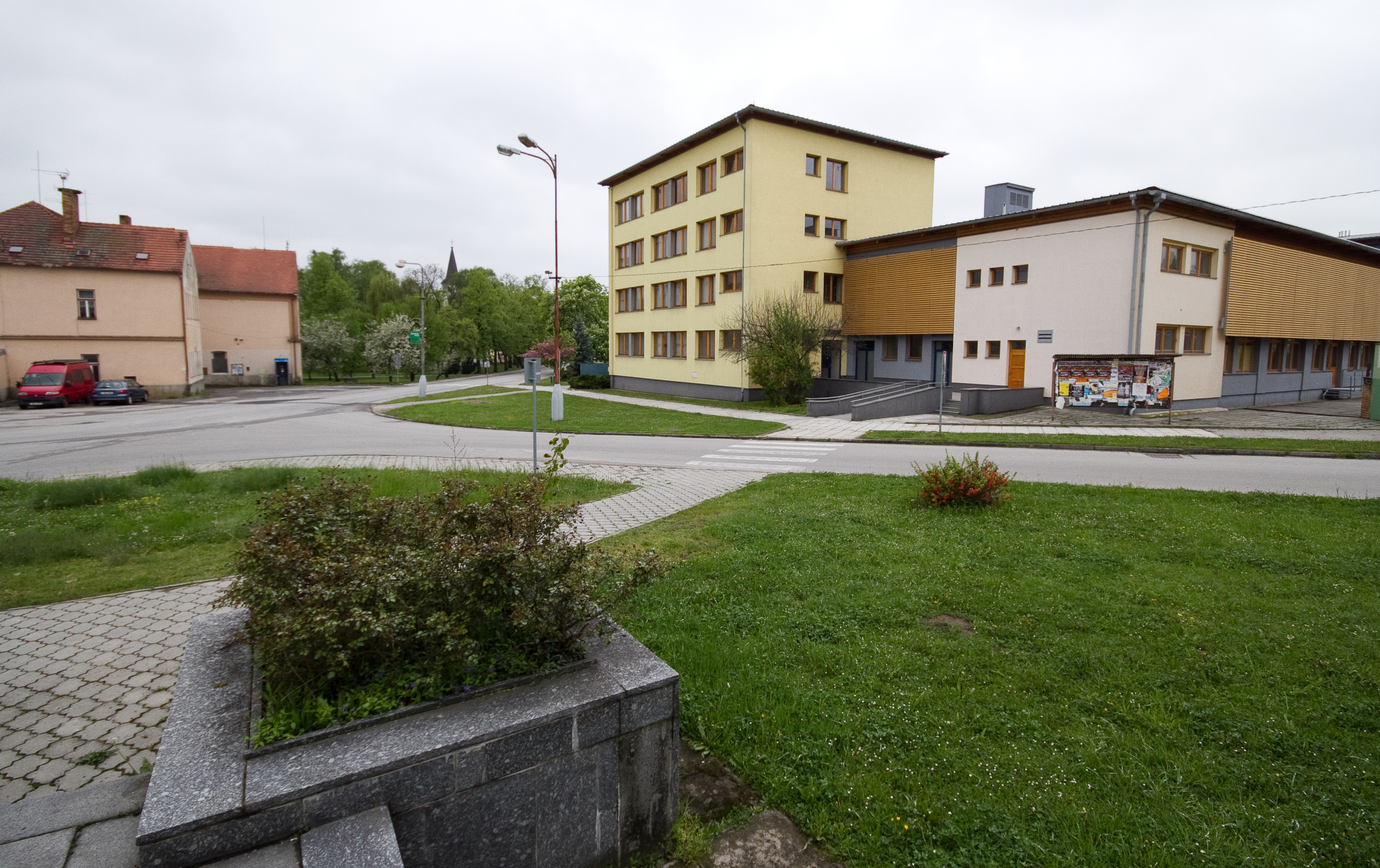 Městský úřad Zliv _2010